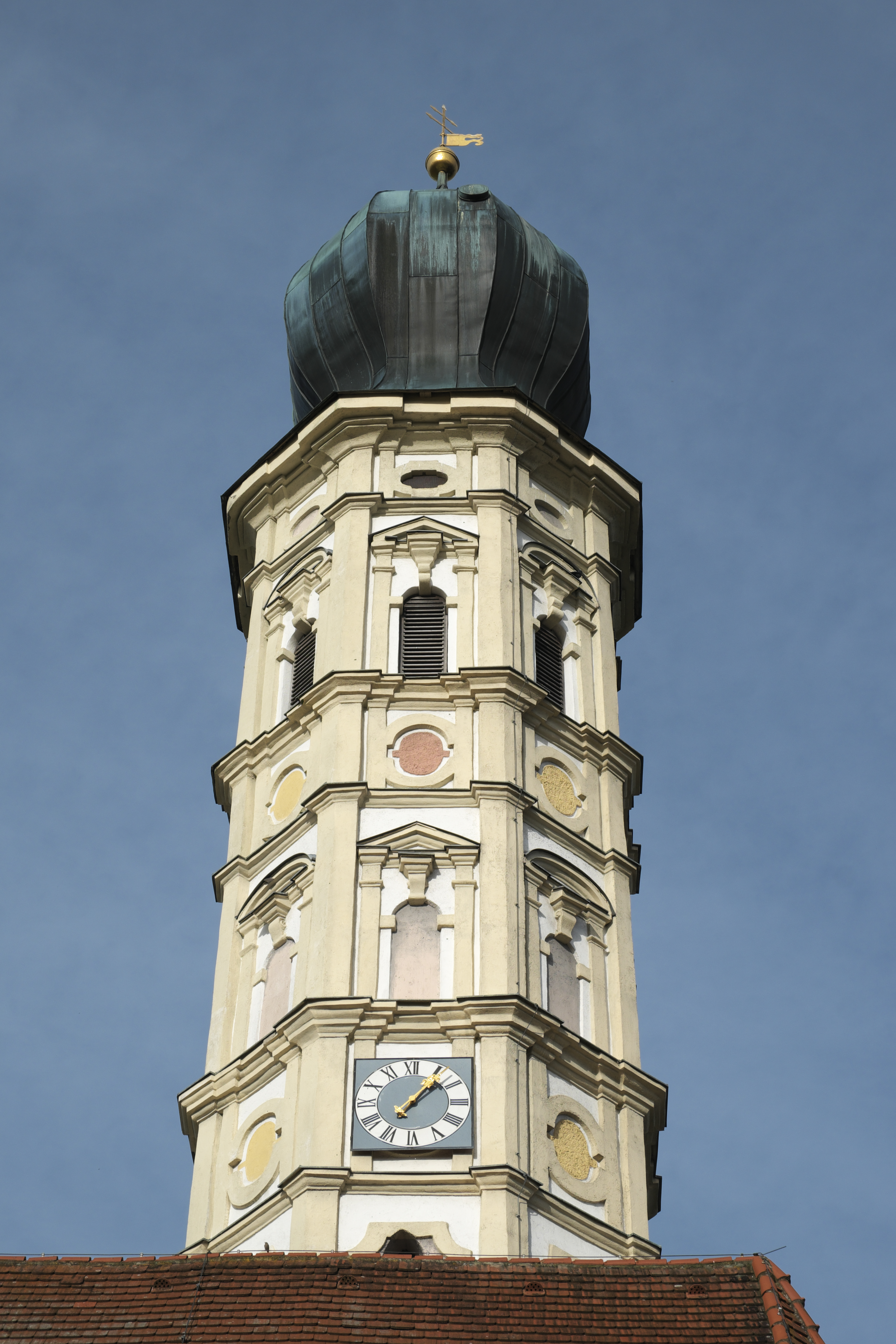 Katholische Filialkirche St. Kastulus in Puchschlagen (Schwabhausen) im Landkreis Dachau (Bayern/Deutschland)